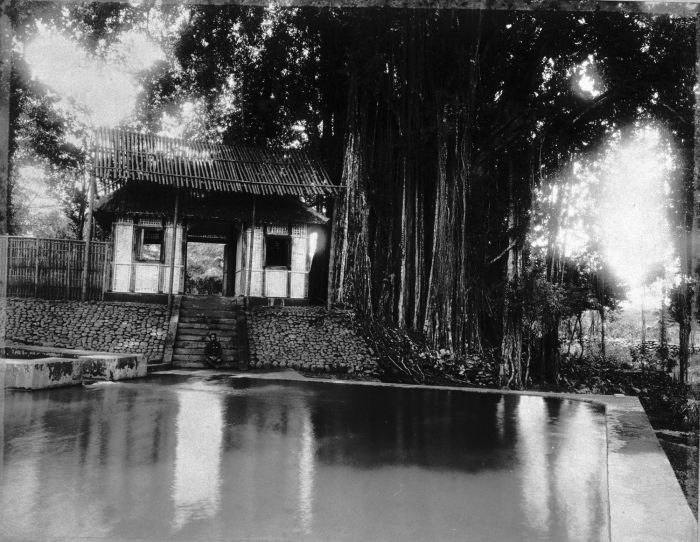 Foto. Badplaats Kedjawar met het badhuis onder de waringinboom in de buurt van Kalibagor en Poerwokerto. Boven het dak beschermt een raamwerk van bamboe de dakbedekking tegen vallende bladeren.